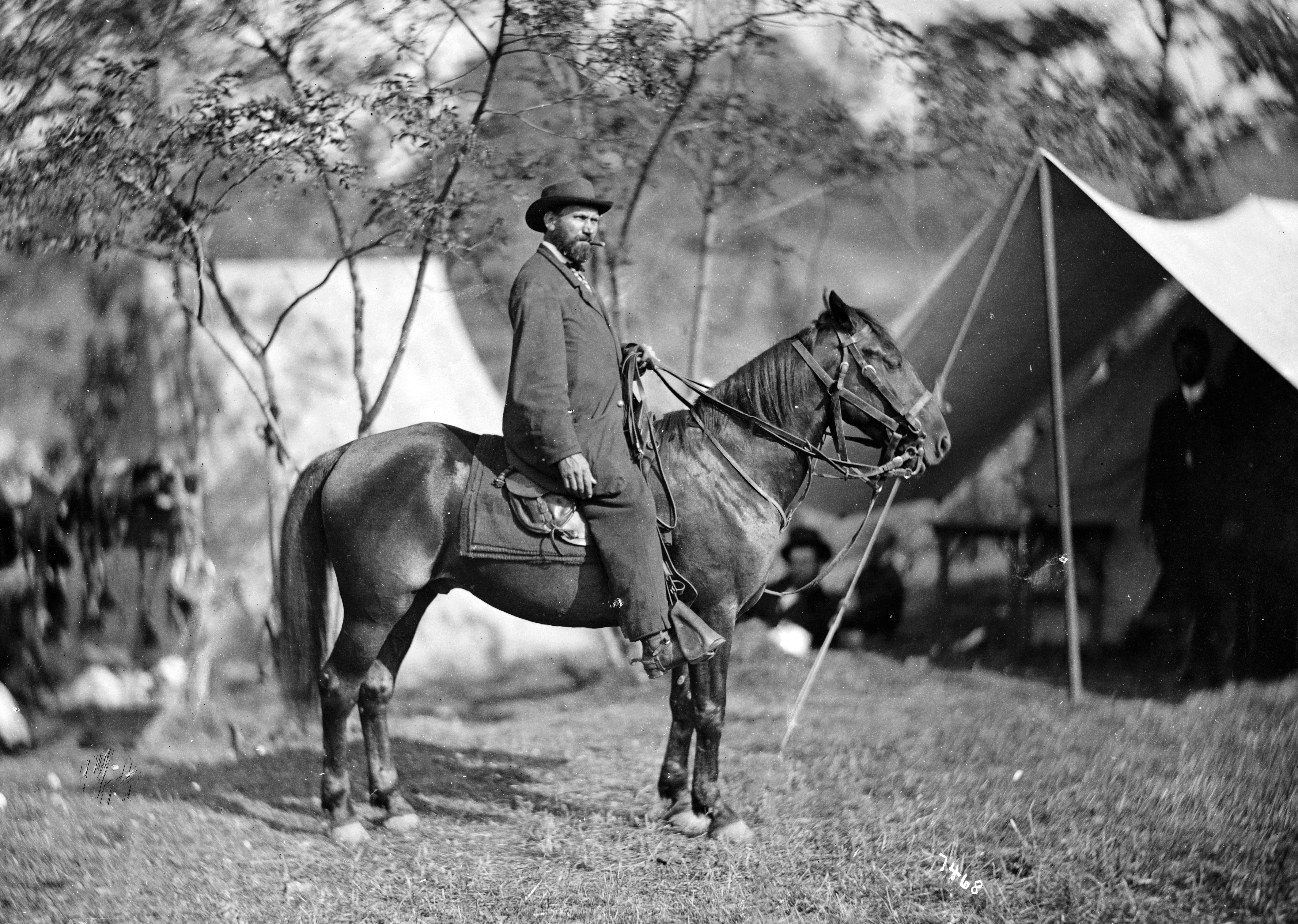 Allan Pinkerton on horseback at Antietam, Md.